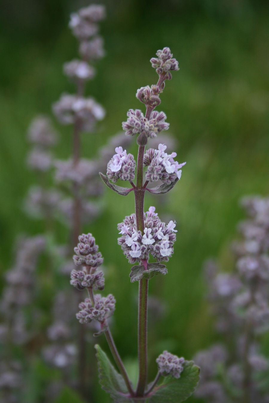 Nepeta nuda subsp. nuda, Lippenblütler (Lamiaceae) - Türkei/Türkiye/Turkey: Prov. Bolu/Bolu ili, Köroğlu Dağları, Sommersiedlung Kızgölcük Yaylası 16-17 km S Bolu, an der Straße nach Kıbrıscık, ca. 1350 m